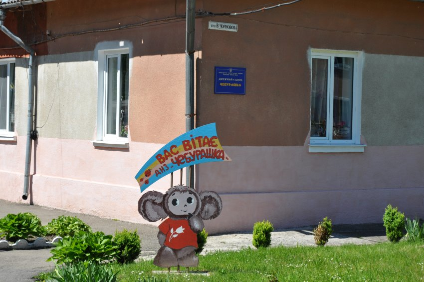 ДНЗ Чебурашка